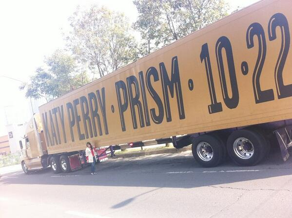 Camión con el que Katy Perry promocionó a su cuarto álbum de estudio Prism, de 2013, en Estados Unidos y México.